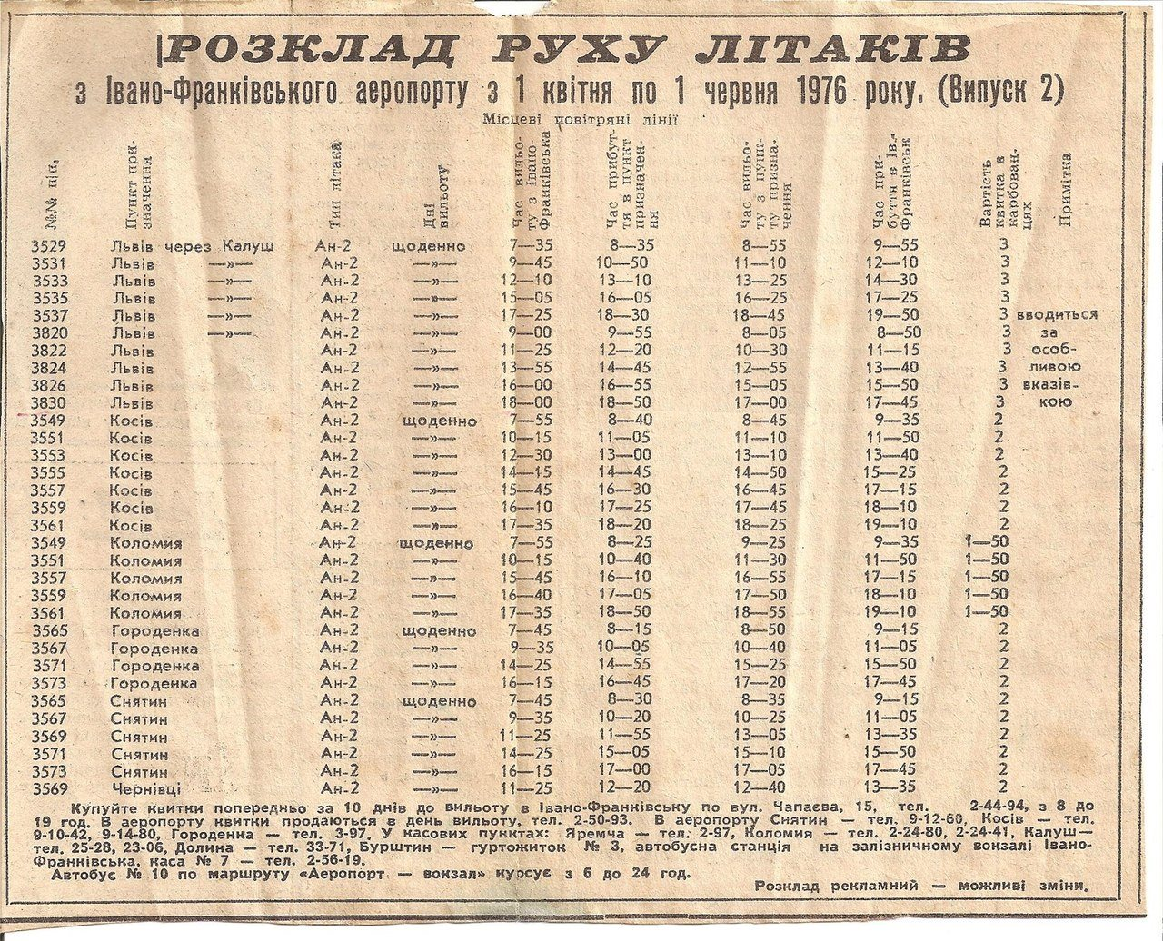 aviarozklad